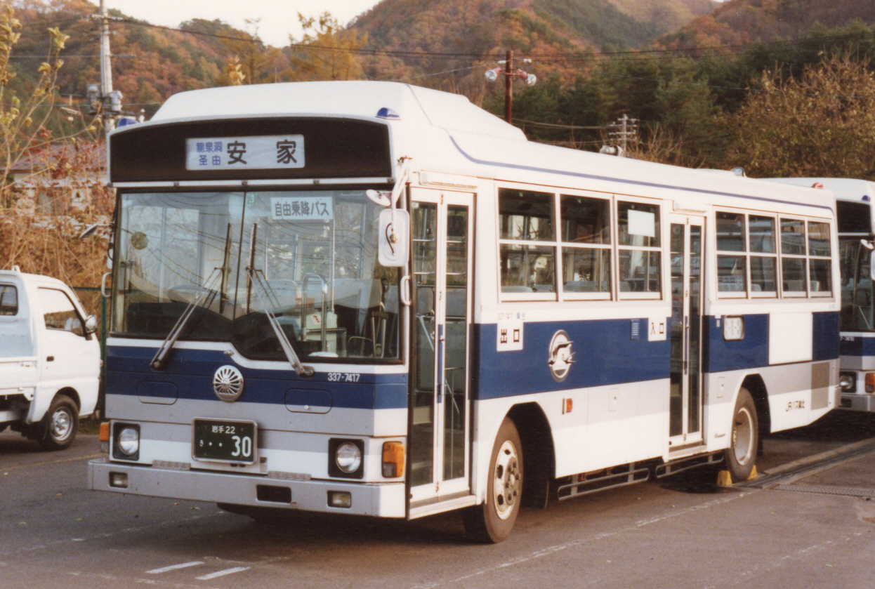 岩泉営業所にて、許可を得て撮影